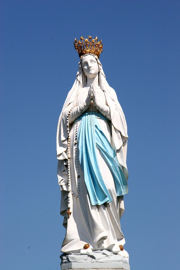 Frankreich: Lourdes, Jungfrau Maria, Que soy era Immaculada Councepciou